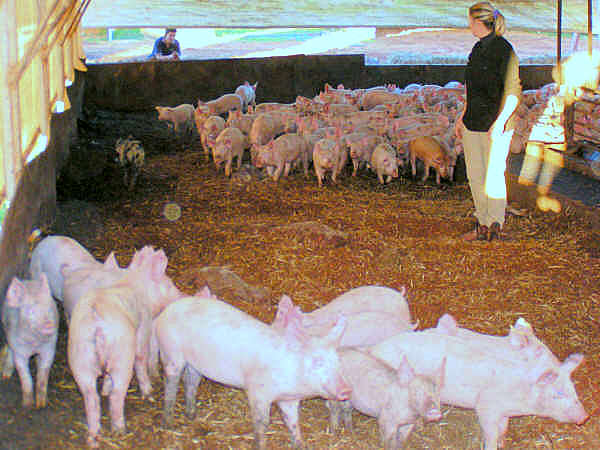 koolie blue merle working pigs